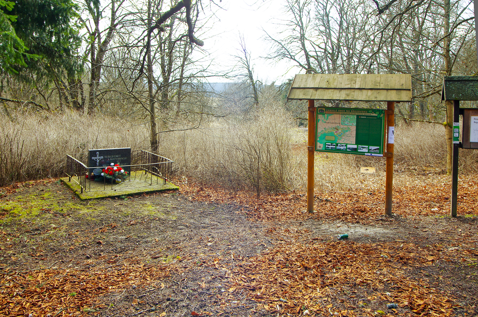 Pomník na památku zaniklé (zničené) obce Čistá (město Čistá, Litrbachy), okres Sokolov, Slavkovský les; více